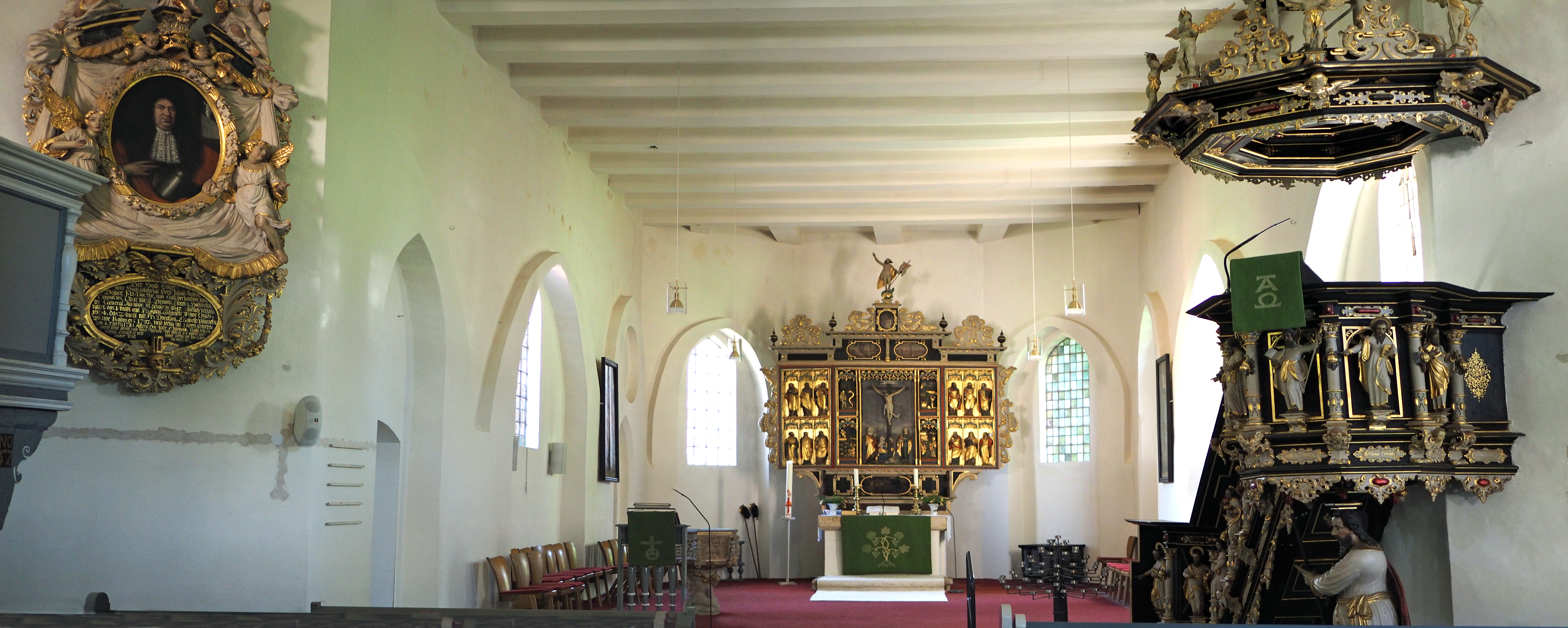 Innenraum mit Altar in der St. Georg-Kirche, Blumlage, Celle